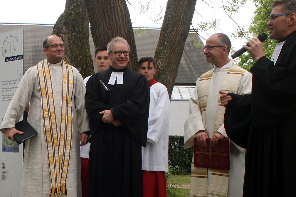 ein Ökumenischer Gottesdienst mit je einem katholischen und evangelischen Dekan und Pfarrer